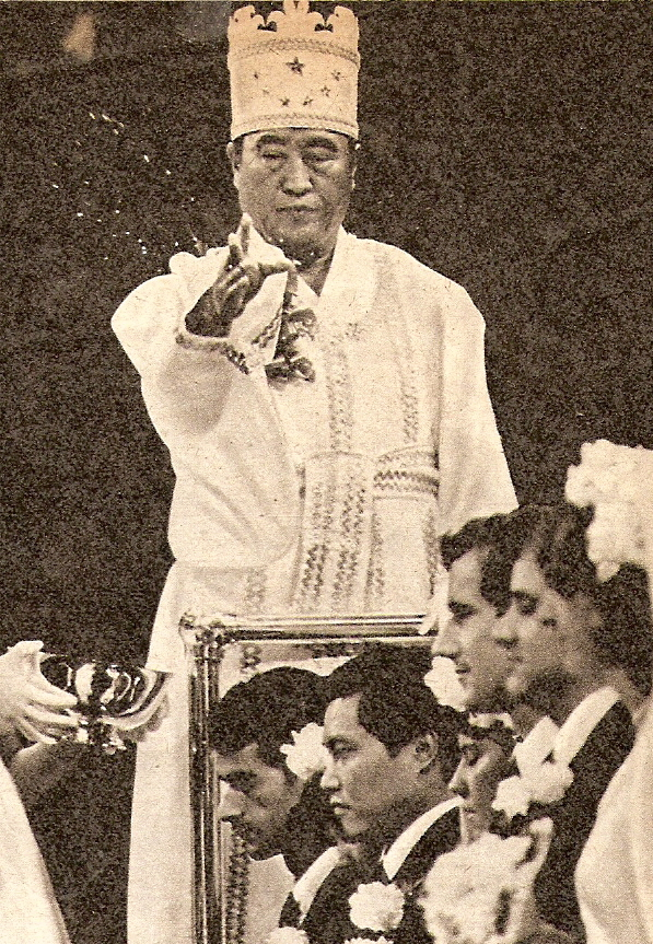 sun myung moon lider de ALADO iglesia de la unificacion